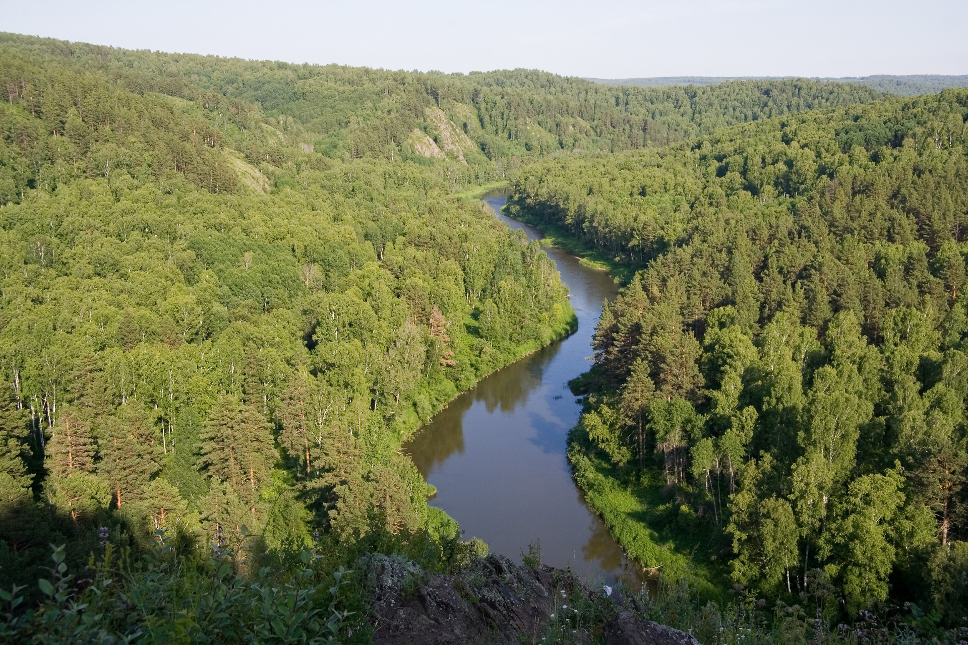 гора Зверобой, напротив обширные лесные массивы, Искитимский район, Новосибирская область This image is related to the protected area of Russia number 5410035